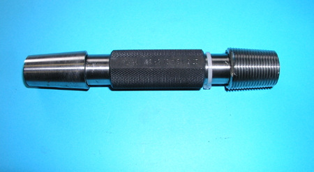 Tampon conique pour contrôle par calibres à limites de filetage conique Photographie prise par / Picture taken by Romary 2005